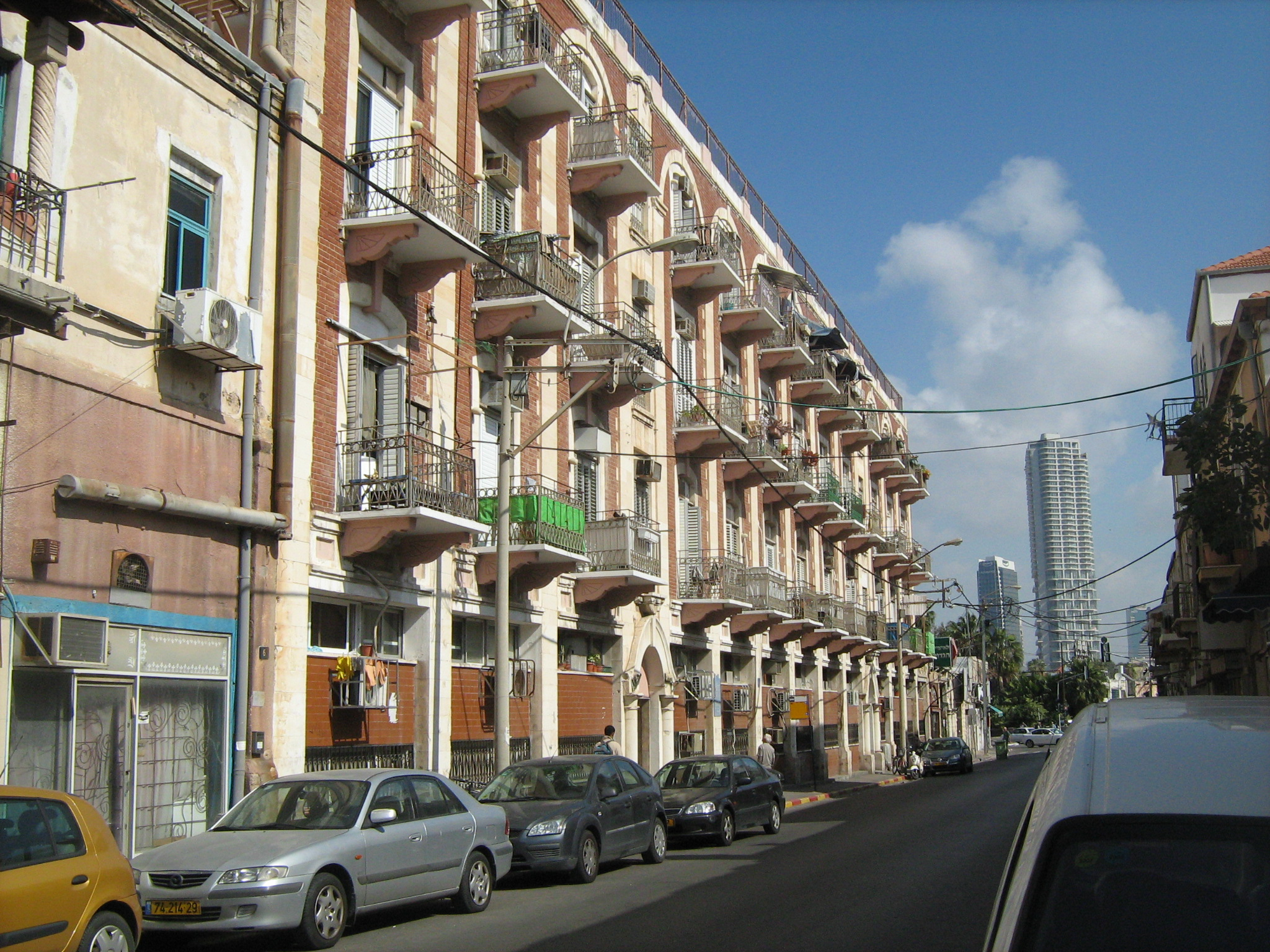 בית סורסוק ביפו